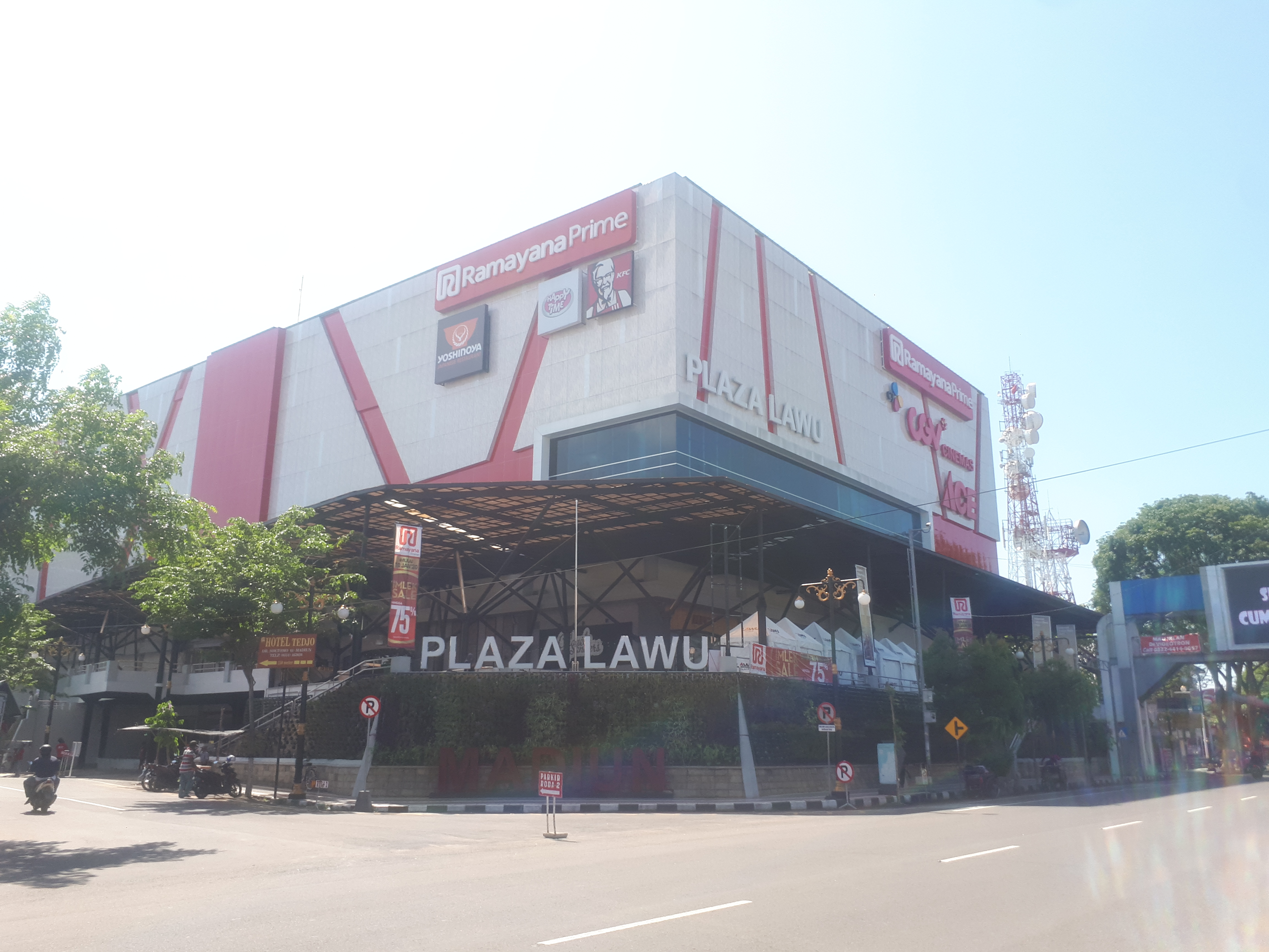 Plaza Lawu teletak di Jalan Pahlawan, Kota Madiun